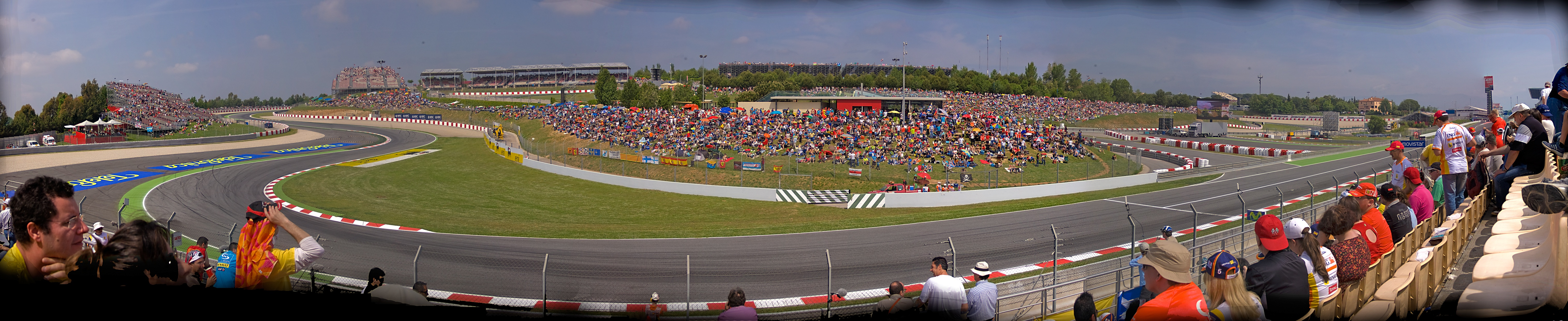 Nikon D90 + Sigma 18-200 DC OS HSM 1/500s - F/11 - 36mm - ISO400